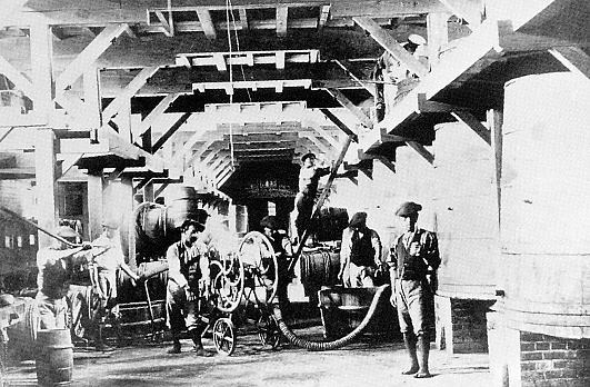 明治40年の醸造所内写真